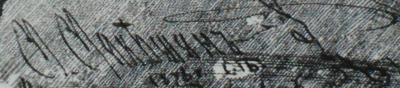 М. Микешин. Типы и виды Кавказа и Малой Азии. Автограф под рисунком: СПб, 1876.